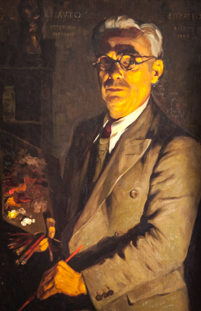 Autoritratto